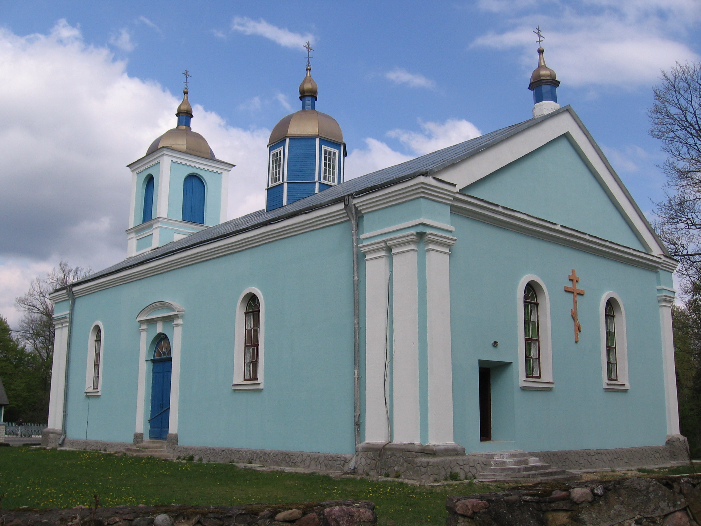 Беларуская (тарашкевіца): Царква Покрыву Найсьвяцейшай Багародзіцы (Гарадзечна). Выгляд з тылу. This is a photo of Belarusian heritage monument. Reference number: 113Г000607 ( WLM)